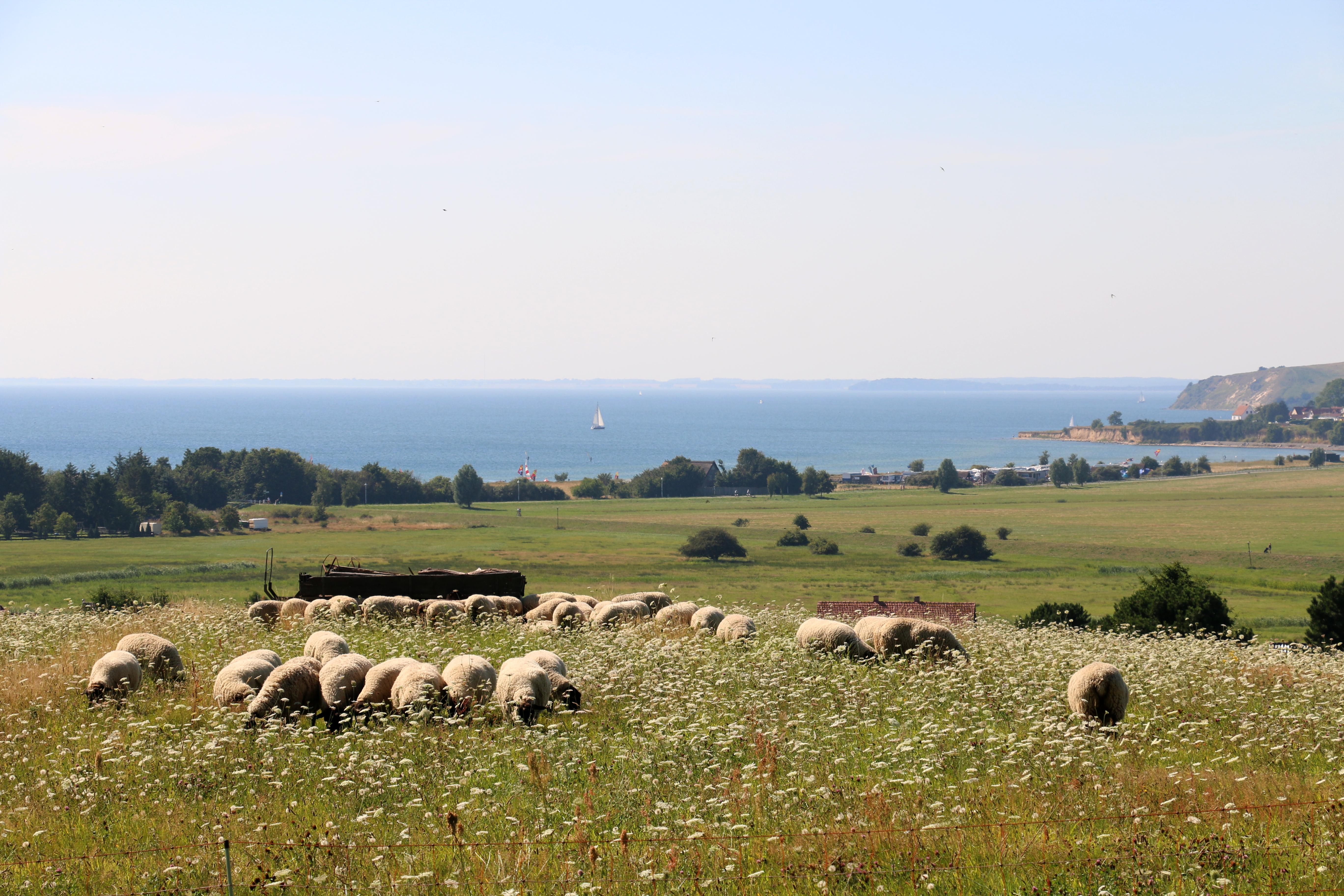 Greifswalder Bodden, im Vordergrund Schafherde bei Thiessow (Mönchgut).